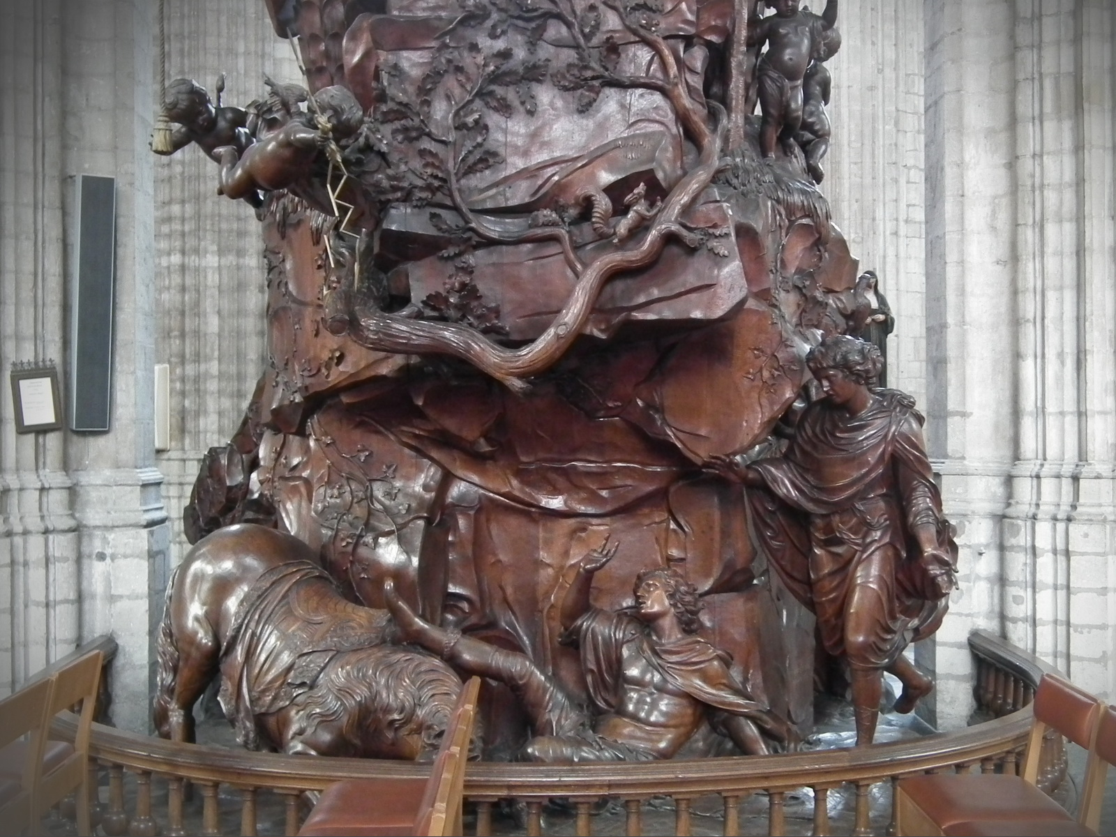 St. Peter's Church, Leuven Native nameSint-Pieterskerk, LeuvenLocationLeuven, BelgiumCoordinates50° 52′ 46.2″ N, 4° 42′ 04.68″ E